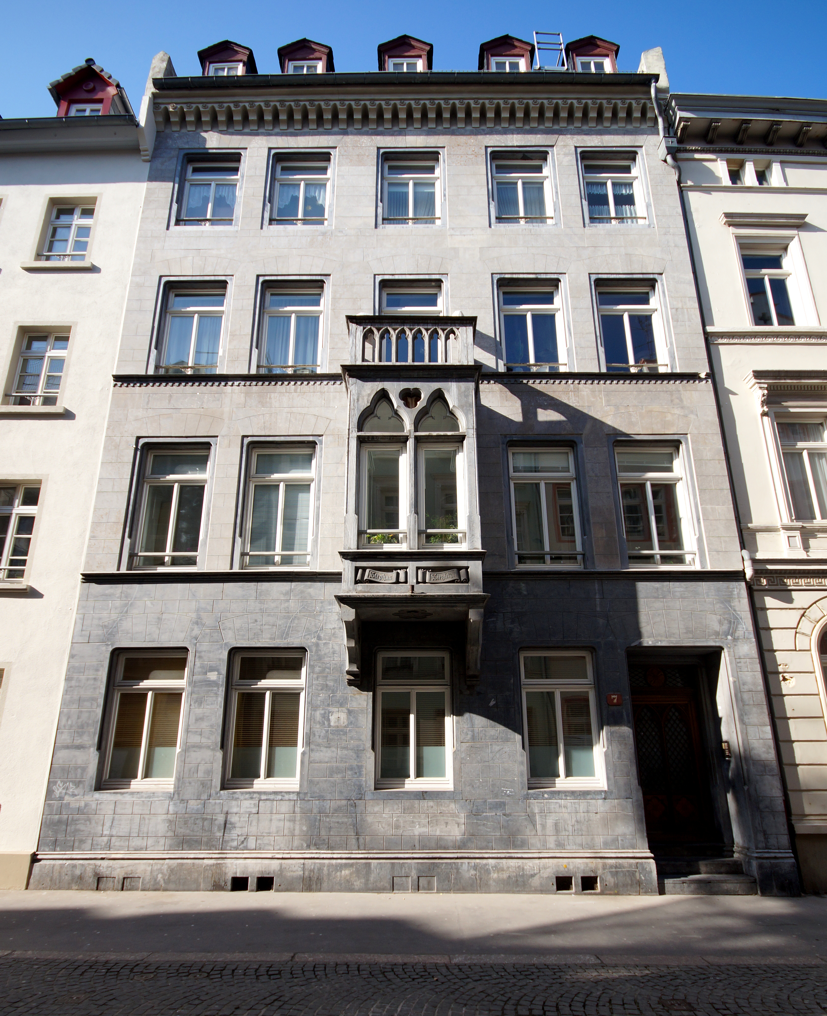 Fassade des Hauses Kartäuserstraße 7 in Mainz-Altstadt